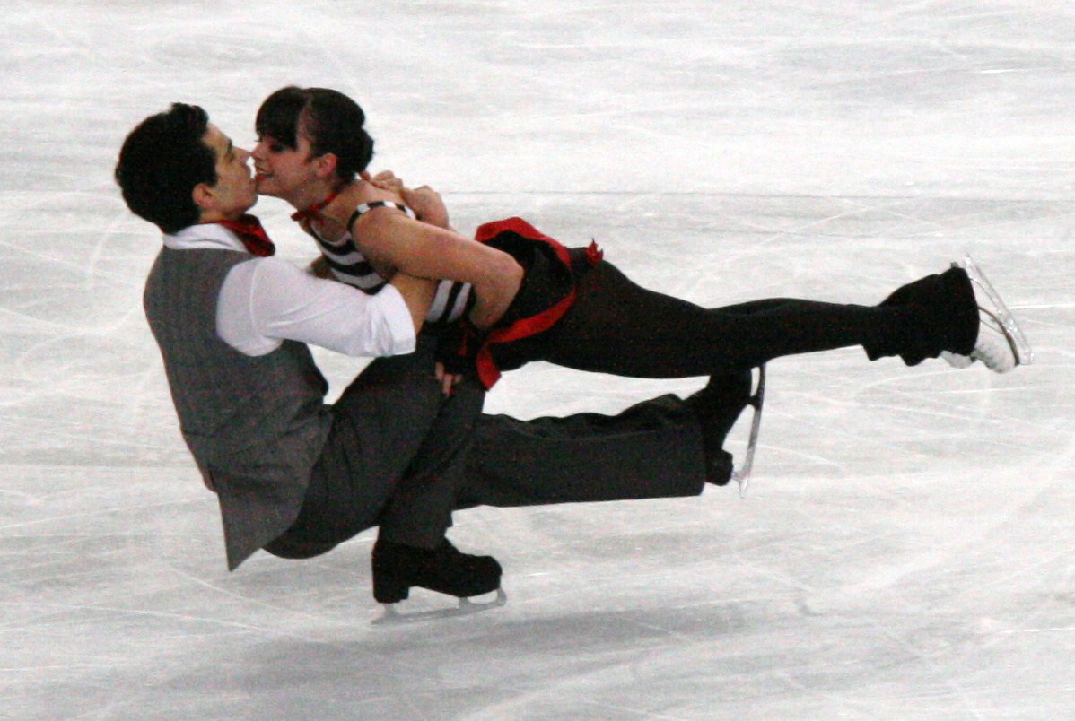 Анна Каппеллини и Лука Ланотте на 2011 Trophée Eric Bompard